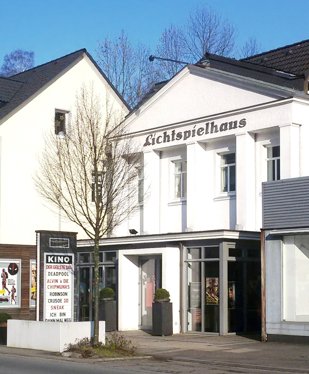 mehrfach ausgezeichnetes Lichtspielhaus in Lennestadt - Altenhundem